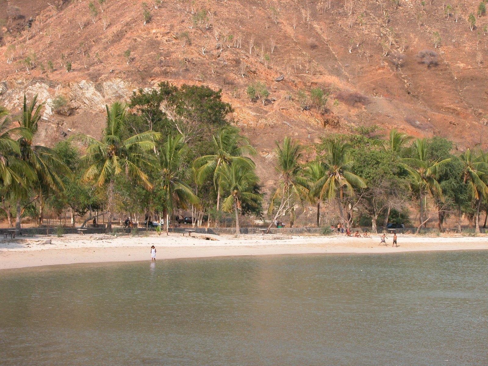 Areia Branca, Dili